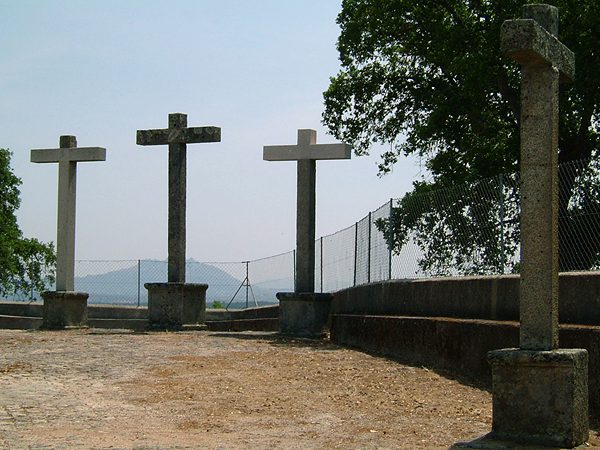 Calvário de Proença-a-Velha